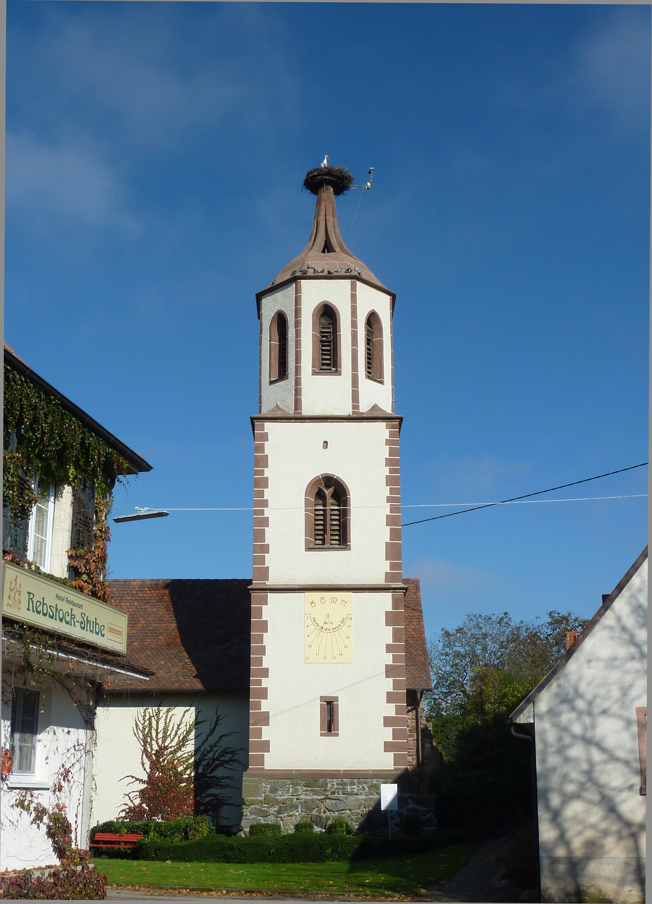 Der Turm von St. Michael in Denzlingen mit Storchennest und Kamera